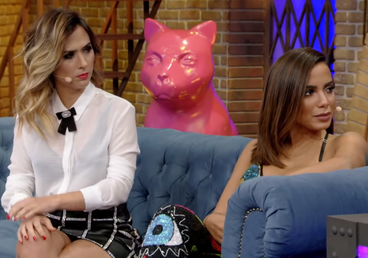 Tatá Werneck entrevistou ninguém menos que a estrela nacional (e agora internacional) Anitta! Vem ver o que as duas fizeram nesse episódio que bombou!